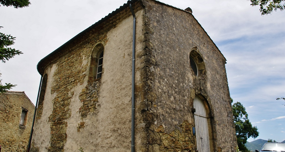 Le Temple